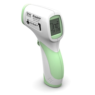 Das berührungslose Infrarot-Thermometer BodyPlus